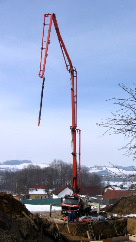 Mobile concrete pump